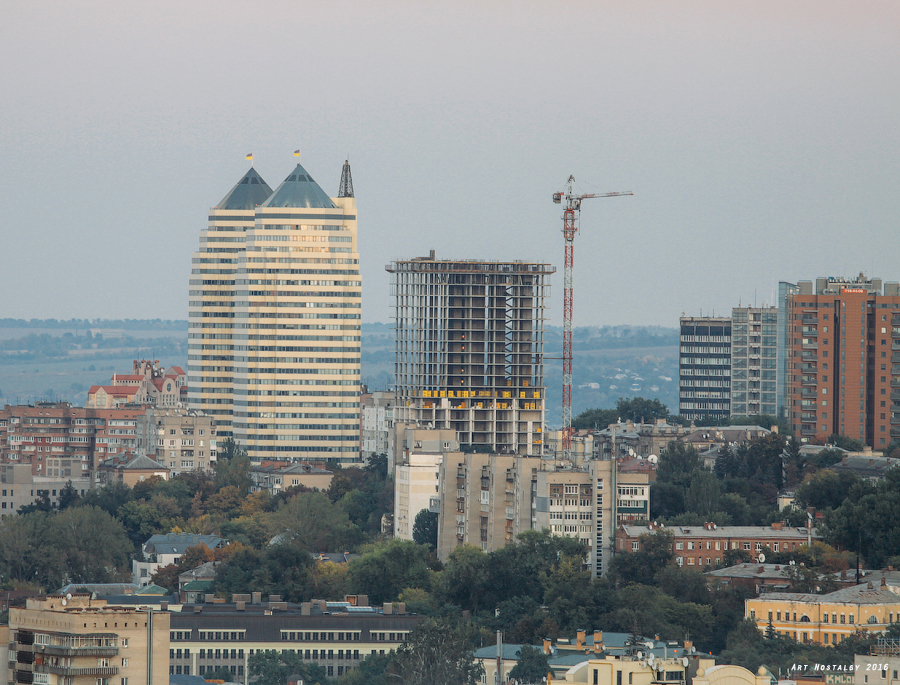 вид на вежі